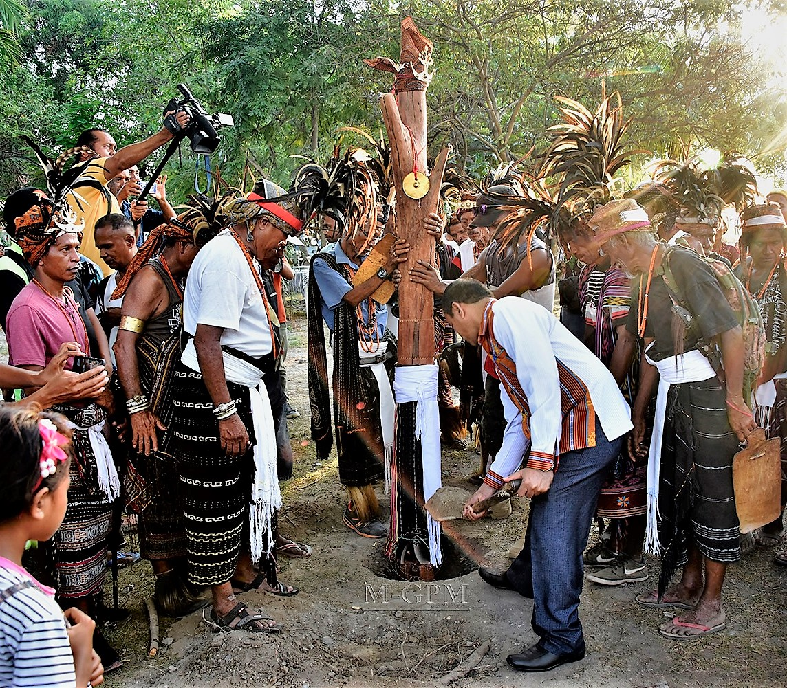 Ein Ai To'os wird in einer Zeremonie im Jardim Farol in der Landeshauptstadt Dili gesetzt.Tetun: PM-TMR Iha Serimonia Ritual Harii Hikas Ai-toos Dili, 19 Maiu 2019: S.Exa. Primeiru-Ministru Taur Matan Ruak, iha sábadu semana-nia rohan, partisipa serimónia ritual harii hikas aí-toos iha Jardim Farol, ne’ebé organiza hosi Sekretáriu Estadu no Kultura no MAE ho halibur lia na’in sira hosi Munisípiu 12 no Rejiaun Administrativa Espesiál Oecússi-Ambeno (RAEOA). Ai-toos ne’e harii hikas muda filafali ba iha Jardim Farol nian (Resintu rezidénsia ofisiál Prezidente PN nia oin) hafoin ida uluk ne’ebé harii iha tinan 2006 iha Jardim Borja da Costa-Motael, ema deskoñesidu estraga no sobu. Serimónia kultural harii hikas aí-toos ne’e nu’udar hola parte ba serimónia komemorasaun Restaurasaun Independénsia RDTL nian ba dala 17, ho objetivu atu bei’ala sira bele kontinua fó matak malirin ba Estadu no Governu hodi kontinua ukun no serbí povu ba bem-estar povo nian. Hola parte iha serimónia refere mak hanesan, Primeiru-Ministru Taur Matan Ruak, Vise Ministru Estatal, Abilio José Caetano, Sekretáriu Estadu no Kultura, Teófilo Caldas, Korpu Diplomátiku sira, reprezentante lia na’in munisípiu 12 no RAEOA, no entidade importante sira seluk